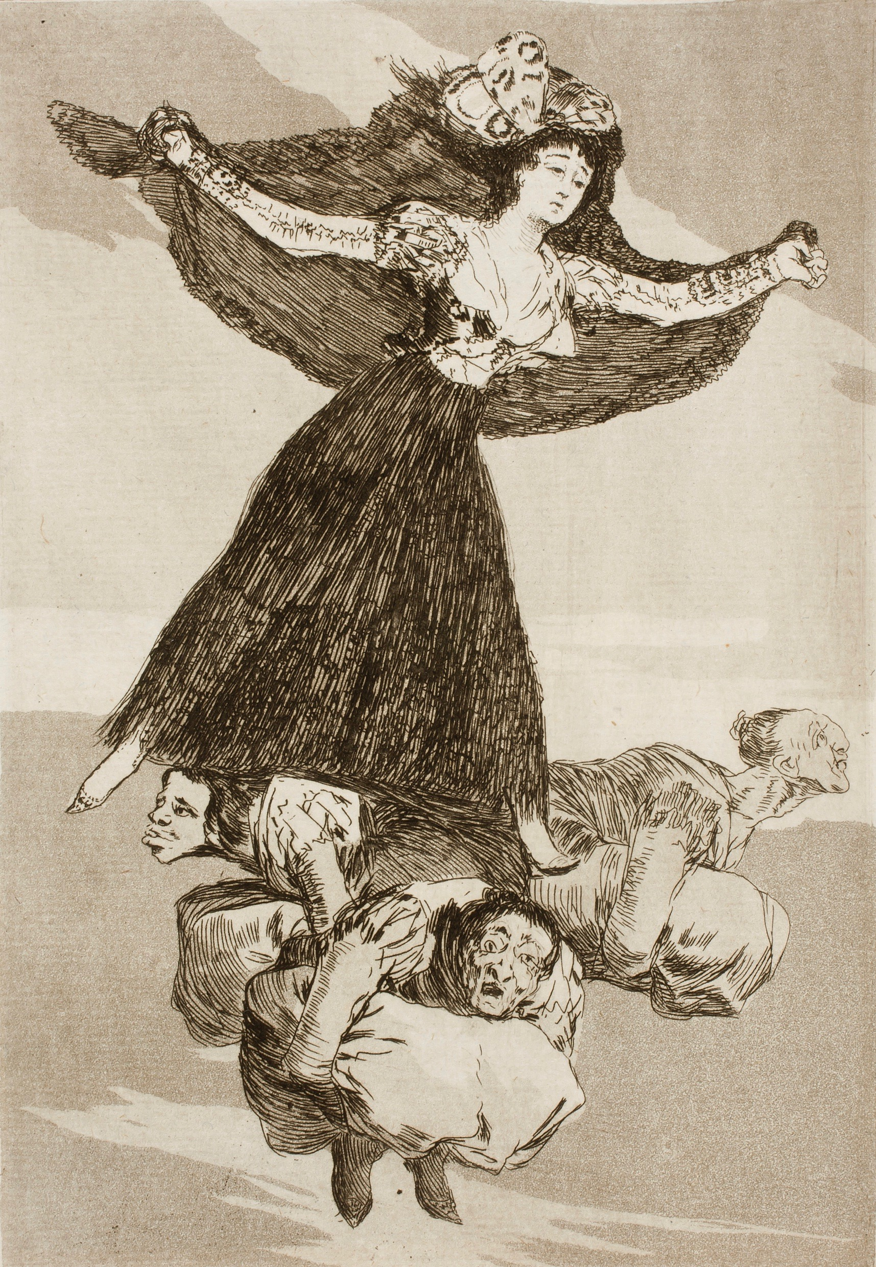 Francisco de Goya (1746–1828): Volaverunt. Los Caprichos 61. Museo del Prado. Randlos.